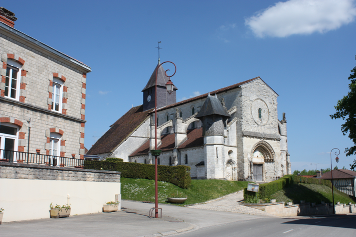 Église Saint-Martin de Somsois (Classé) .